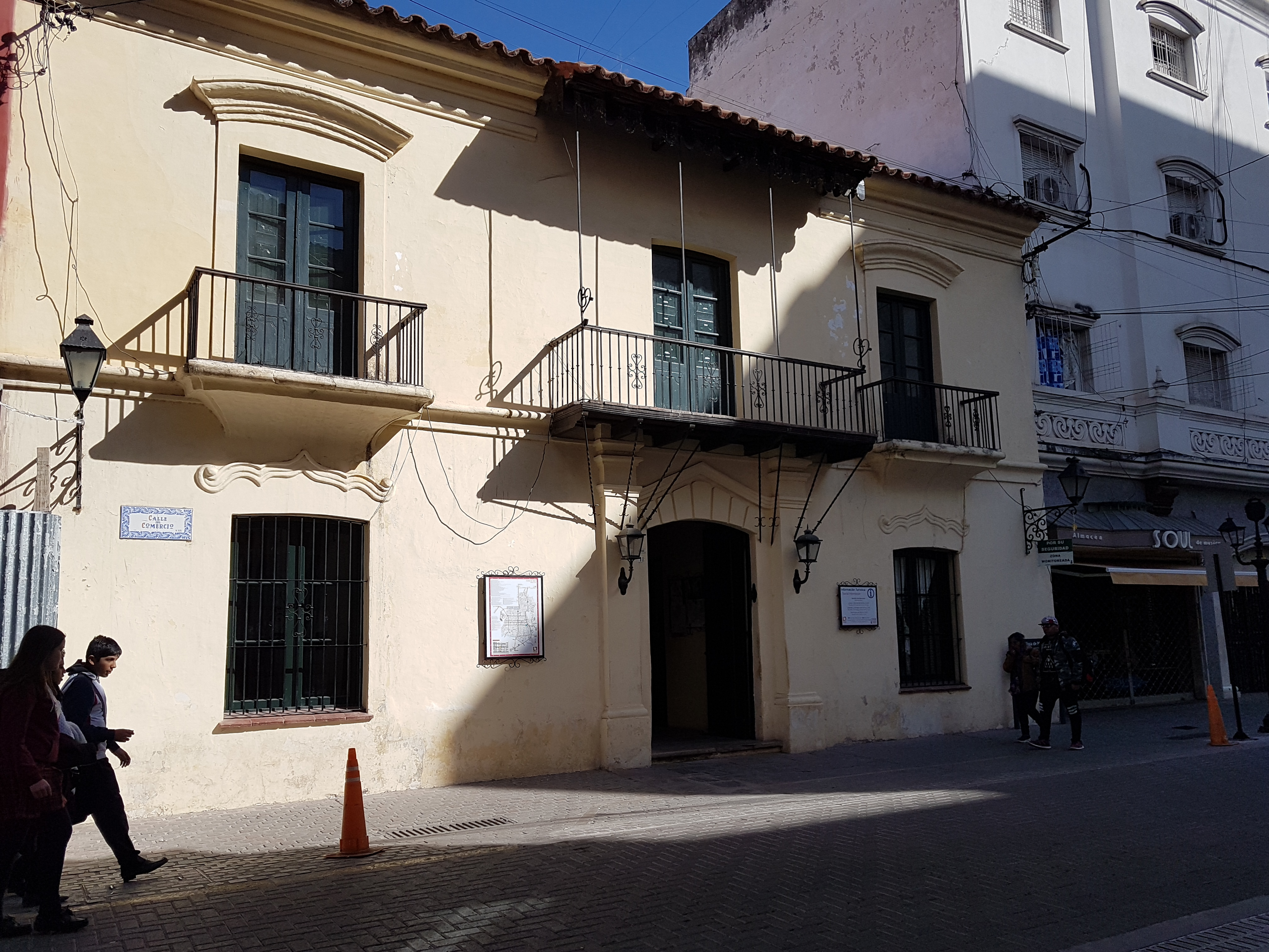 Casona de la calle Caseros, construida en el siglo XVIII,perteneciente al estilo colonial, perteneciente al matrimonio del Alcalde don José Antonio de Moldes y González y doña Antonia Fernández de Loria y Arias Velásquez, padres del Coronel José de Moldes. Este militar y político salteño, que fue representante de Salta del Tucumán y Vicepresidente de la Asamblea General Constituyente del año 13, en nuestra provincia dio nombre a su propio pueblo, y dejó en pie esta morada que en la actualidad es donde funciona la Secretaría de Turismo y Cultura de la Municipalidad de la Ciudad de Salta.fachada de edificio